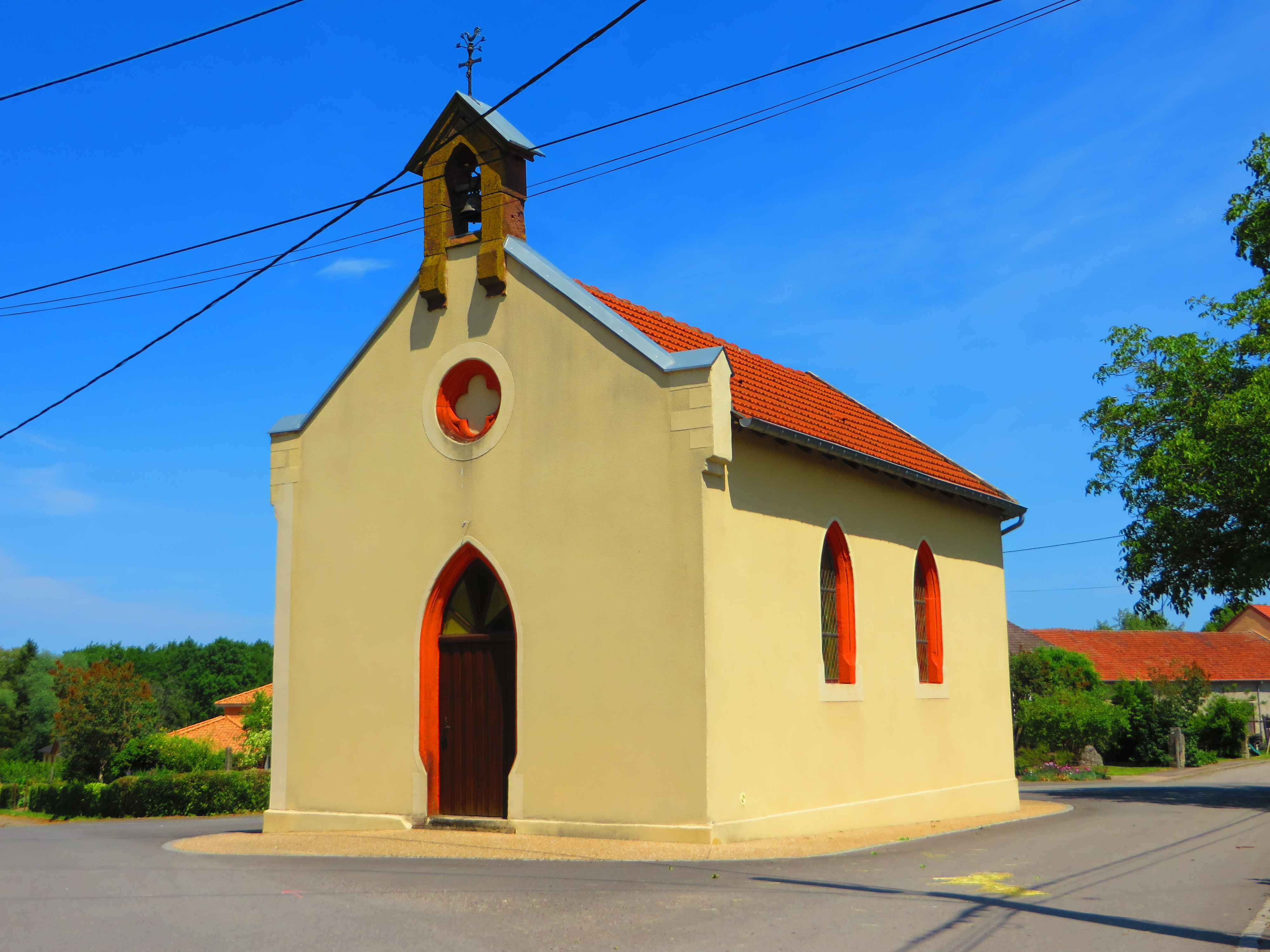 Laumesfeld Calembourg chapelle